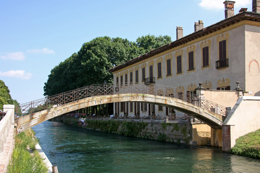 Il ponte degli scalini e Villa Gaia a Robecco sul Naviglio (MI)